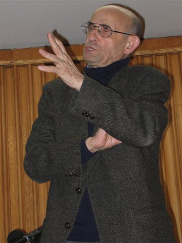 Bronisław Baczko (1924-2016), Polish philosopher